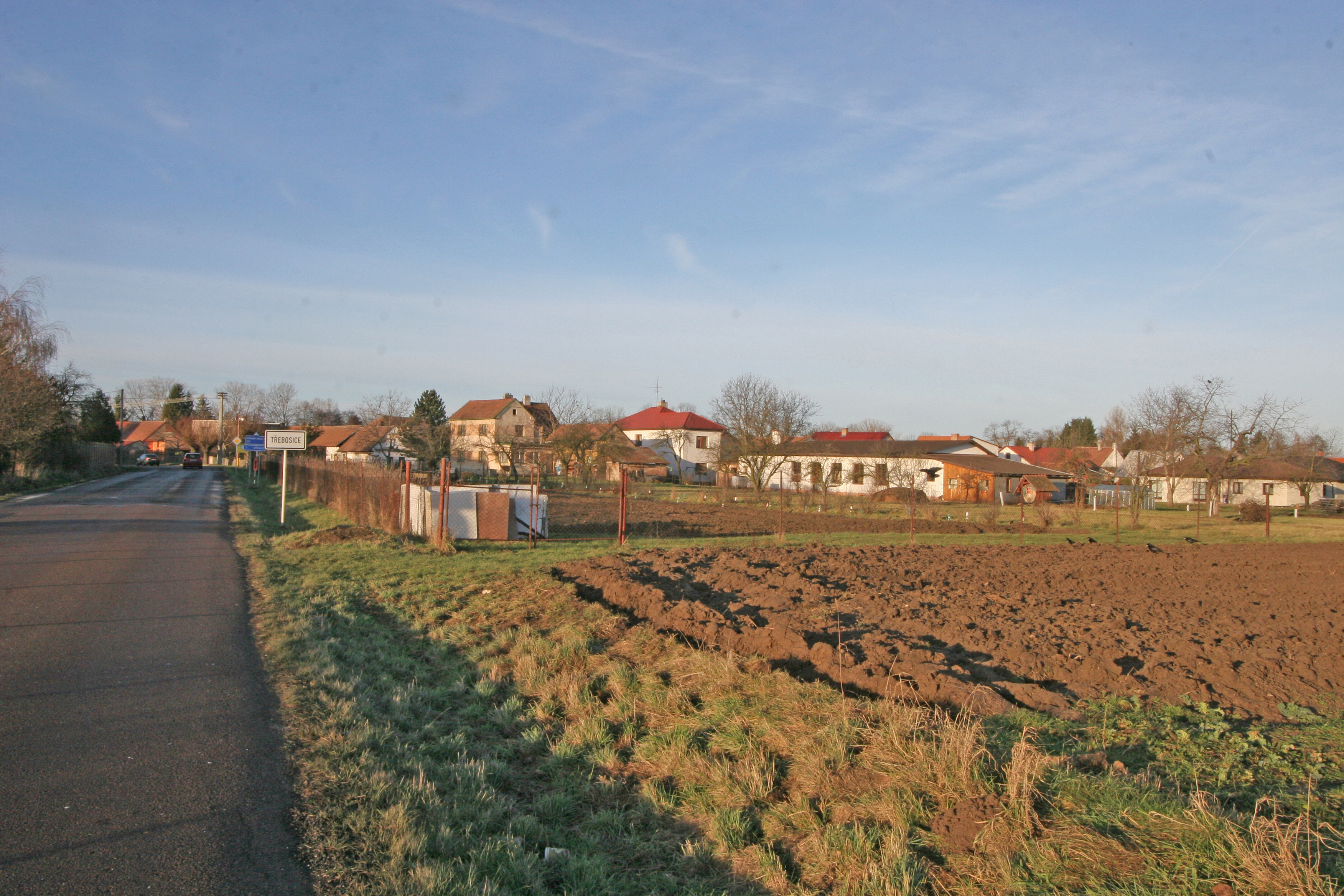 Třebosice příjezd od Starých Jesenčan